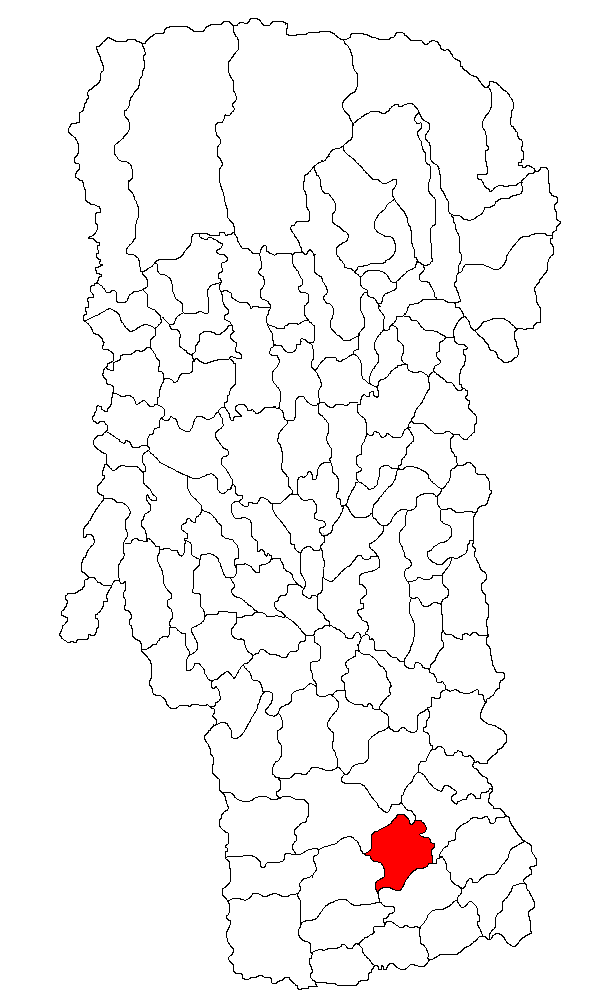 Categorie:Hărţi ale judeţului Argeş